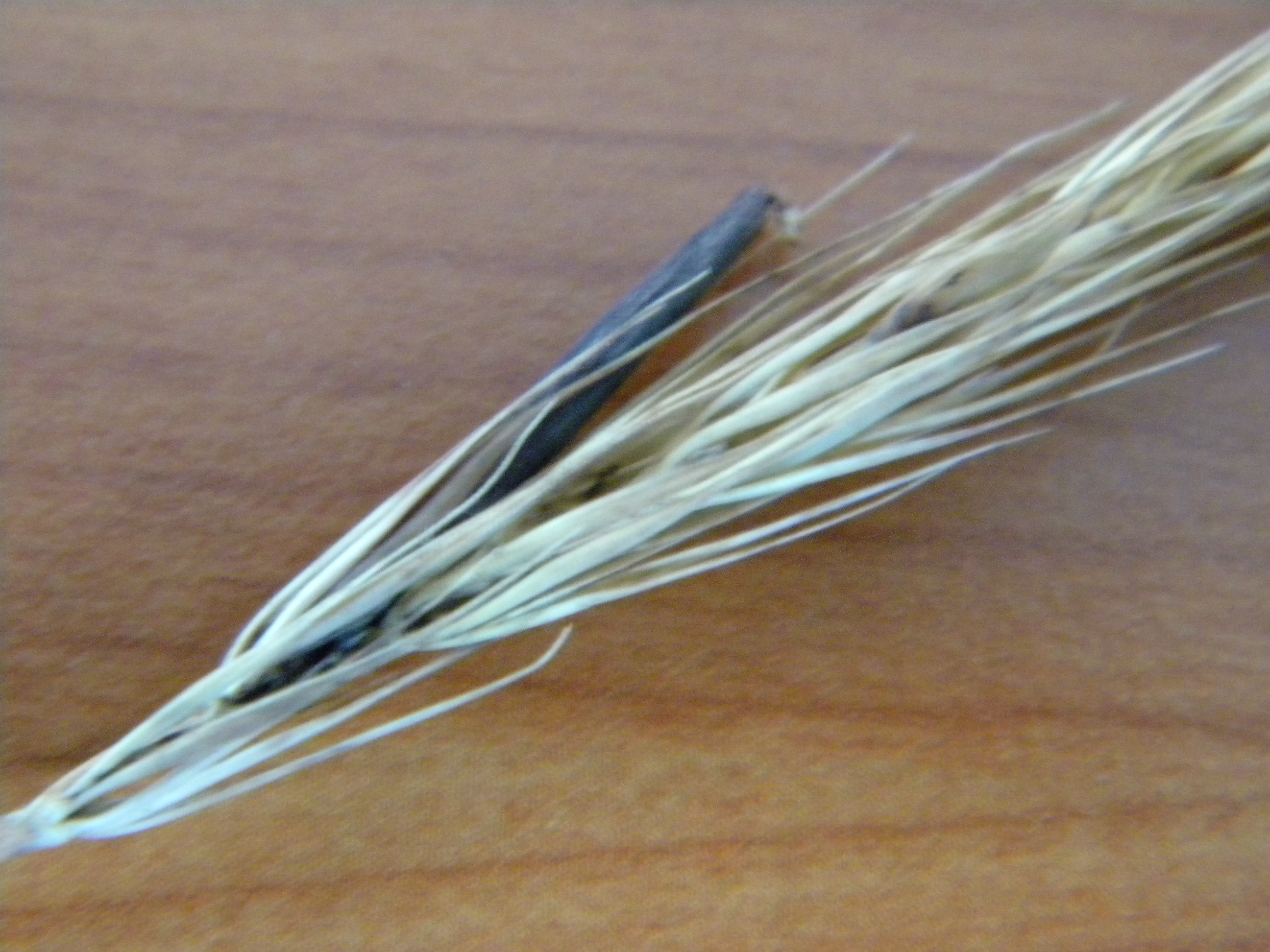 Hordelymus europaeus (L.) Harz [1885, Samenk. : 114] kun Claviceps purpurea 19/9/2009 45 13 19 87 N 5 32 27 38 E